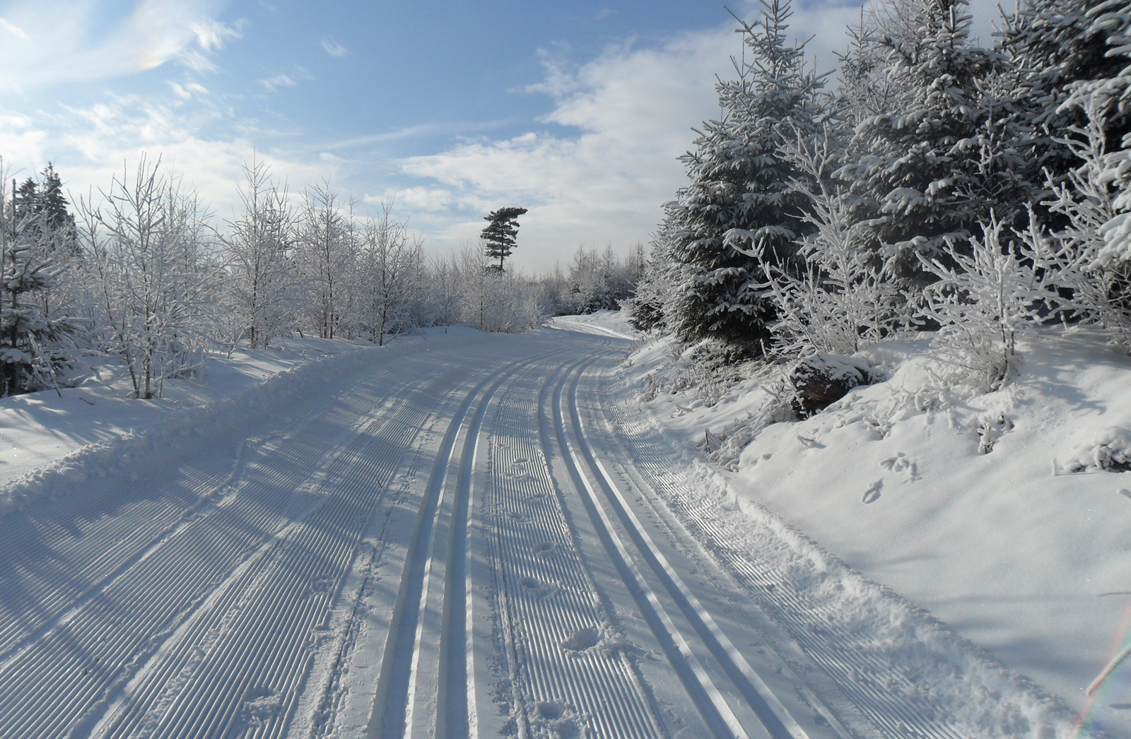 Narciarskie trasy biegowe na Jamrozowej Polanie